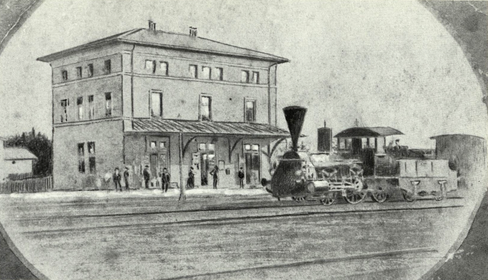 Bahnhof Schwaben auf einer Ansichtskarte um 1875. Links das Empfangsgebäude im Ursprungszustand vor Errichtung der beiden Seitenflügel, rechts eine Dampflokomotive der bayerischen Gattung A V.